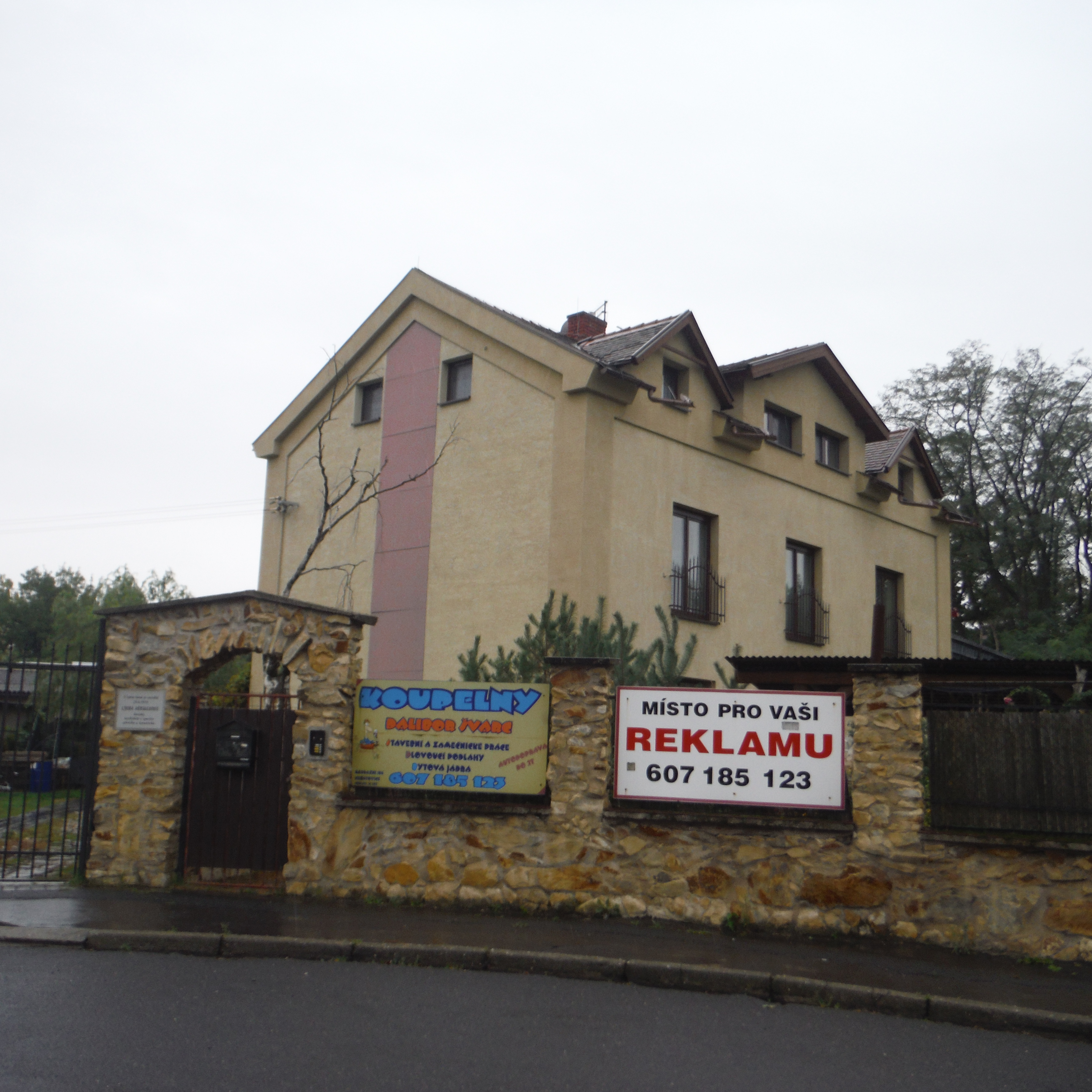 Rodný dům